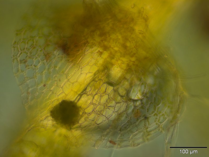 Verschiedenblättriges Kammkelchmoos (Lophocolea heterophylla), Unterblatt, 250x vergrößert